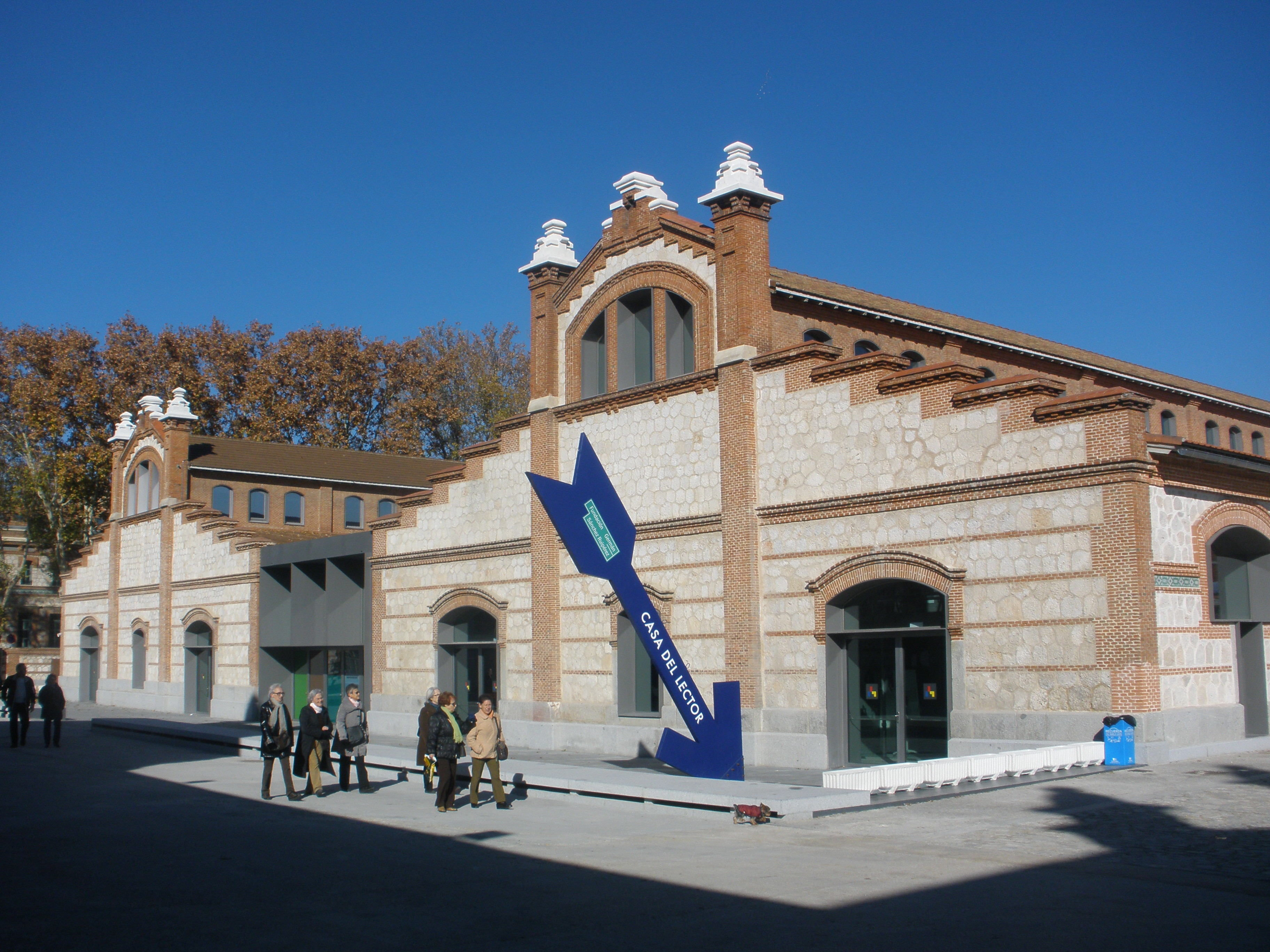 Casa del Lector (Matadero Madrid) en diciembre 2012